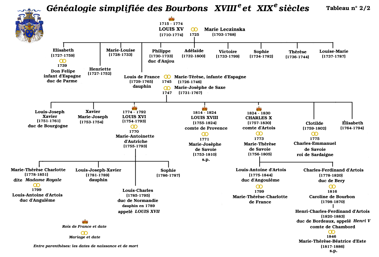 Tableau généalogique simplifié de la dynastie des Bourbons de France